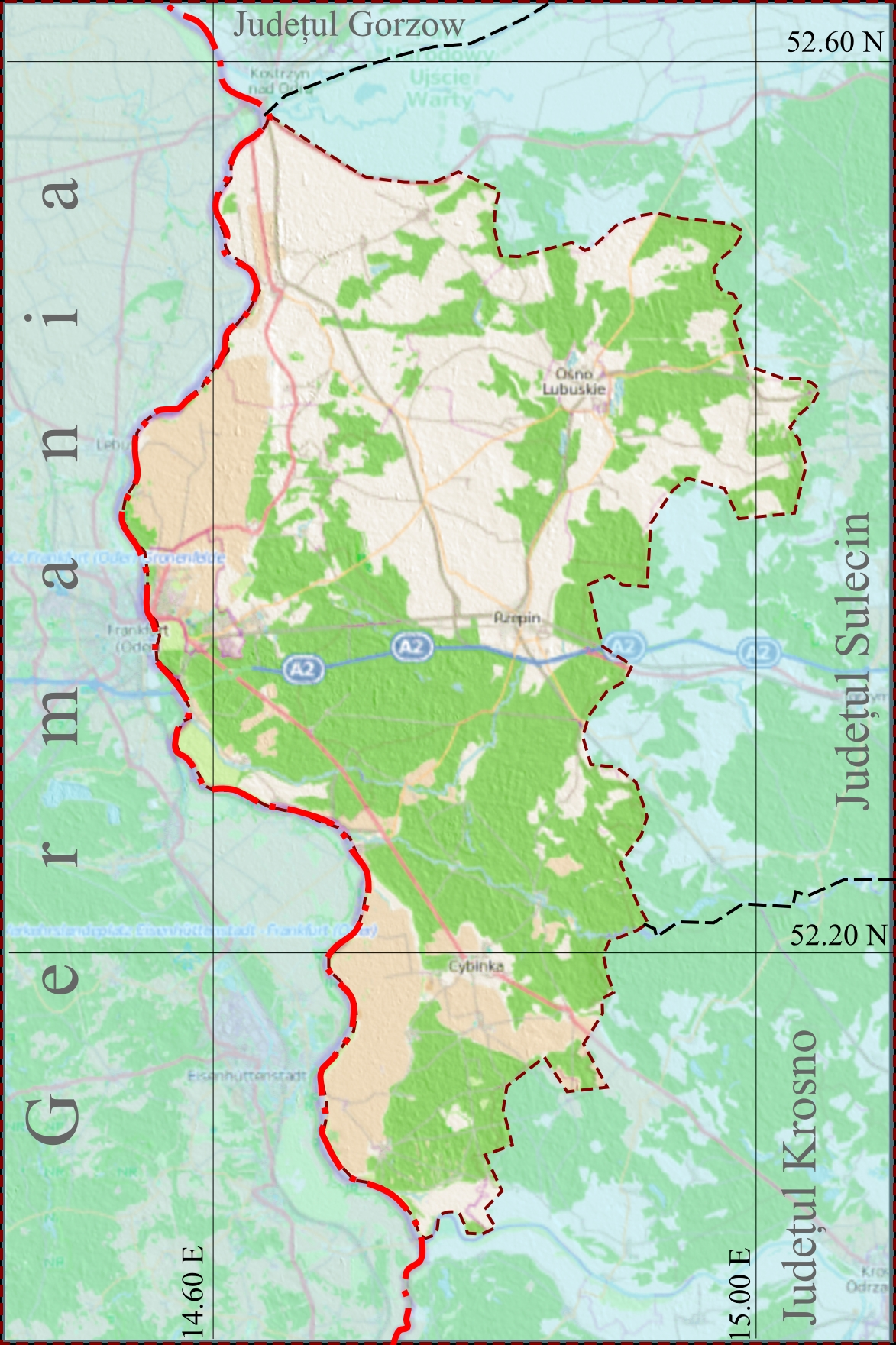 Harta de localizare a Judeţului Sulecin din Voievodatul Poloniei, Lubusz. Coordonate: Top: 52.625 Bottom: 52.025 Left: 14.45 Right: 15.1